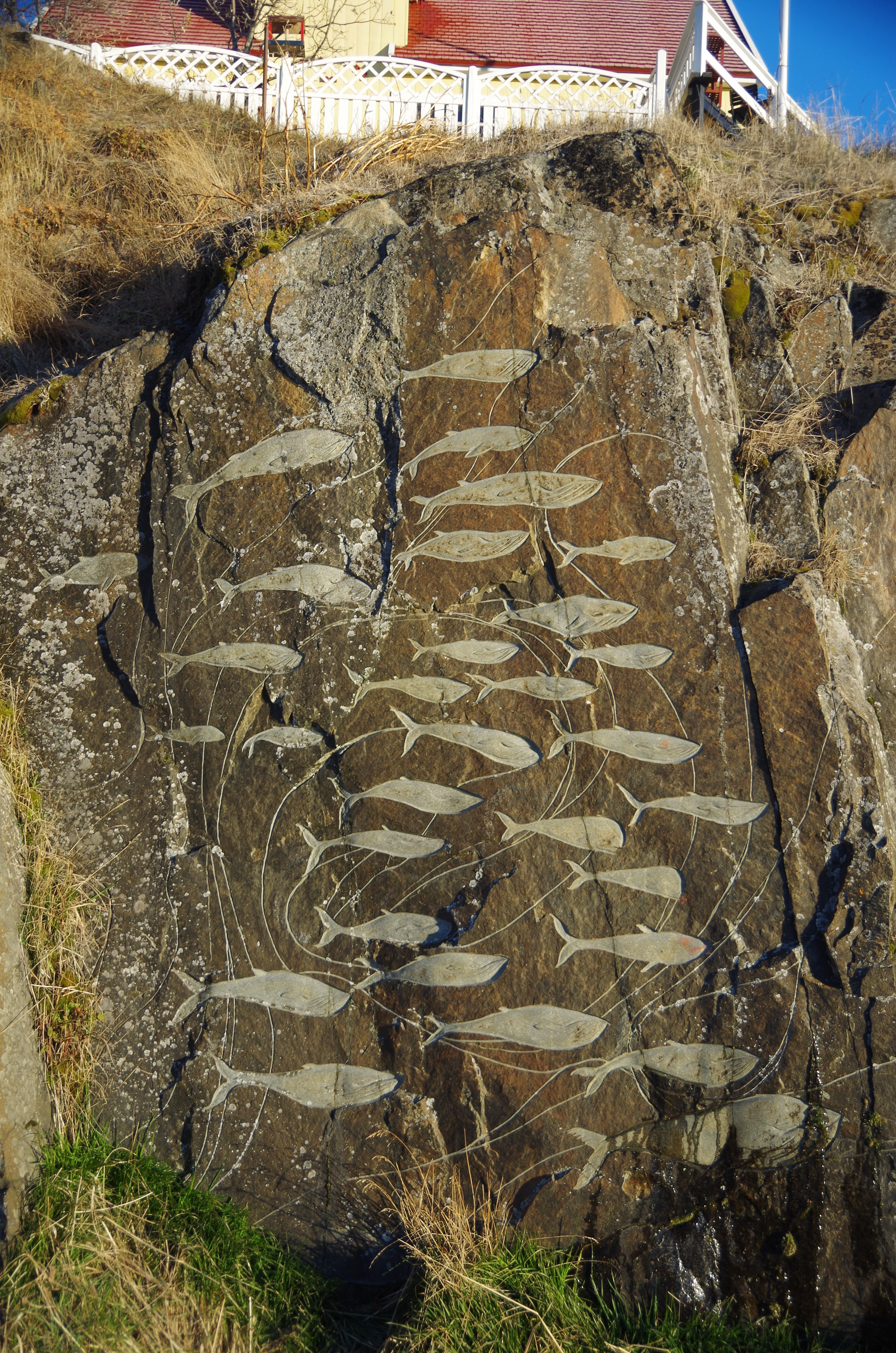 Relief an einer Felswand in Qaqortoq